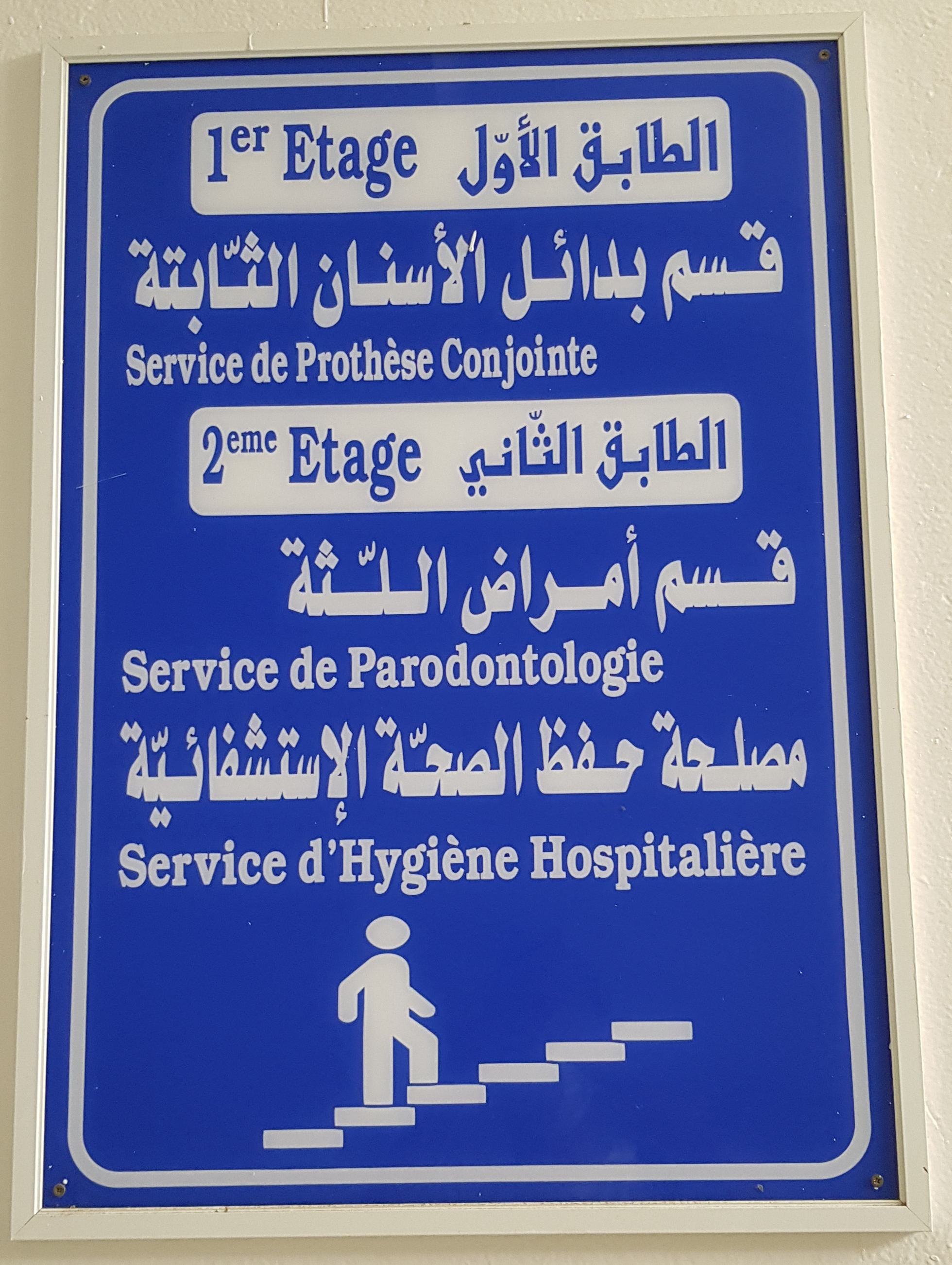 clinique de la FMDM